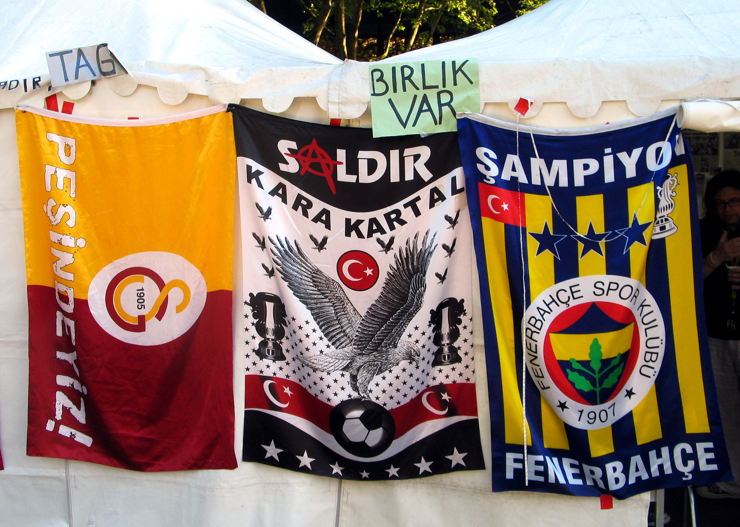 Nach Informationen an der Mahnwache am Klagesmarkt in Hannover haben die drei Fußball-Vereine, deren Fahnen hier nebeneinanderhängen, anlässlich der Proteste in der Türkei 2013 Frieden geschlossen und sich den Demonstranten in Istanbul angeschlossen ...